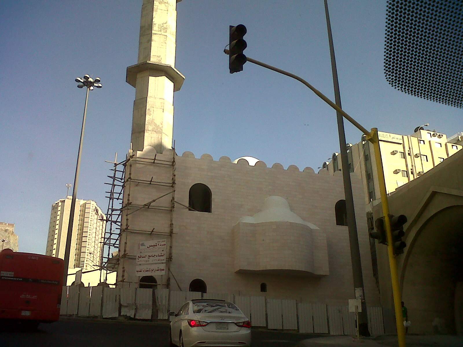 ajyad mosque